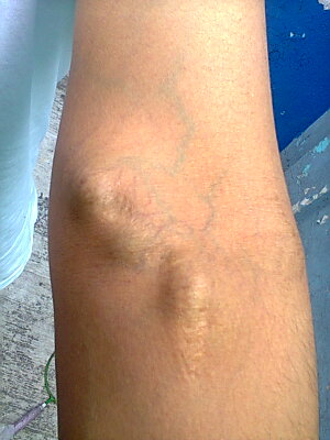 Presencia de un aneurisma en una fistula arteriovenosa.